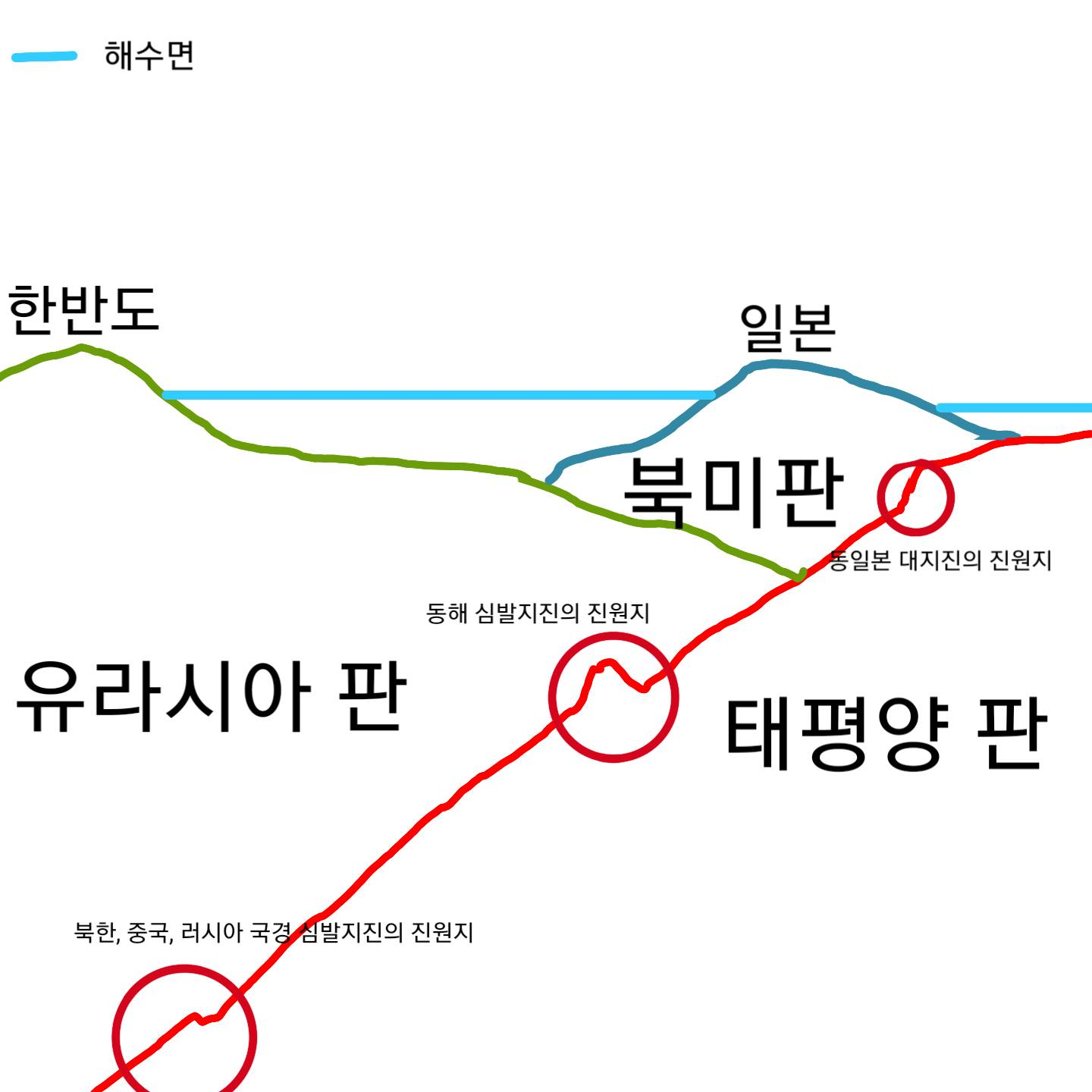 동아시아 내부 지질구조를 그린 그림. 왼쪽 맨 아래는 훈춘-왕칭 심발지진대를, 오른쪽은 동해 중부 심발지진대를, 가장 오른쪽은 도호쿠 지방 태평양 해역 지진이 일어난 곳을 가리킨다.